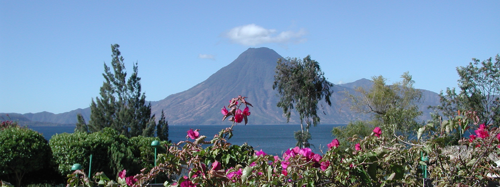 Panorama-Aufnahme des Atitlan-Sees mit Blick auf den San Pedro-Vulkan von Panajachel aus